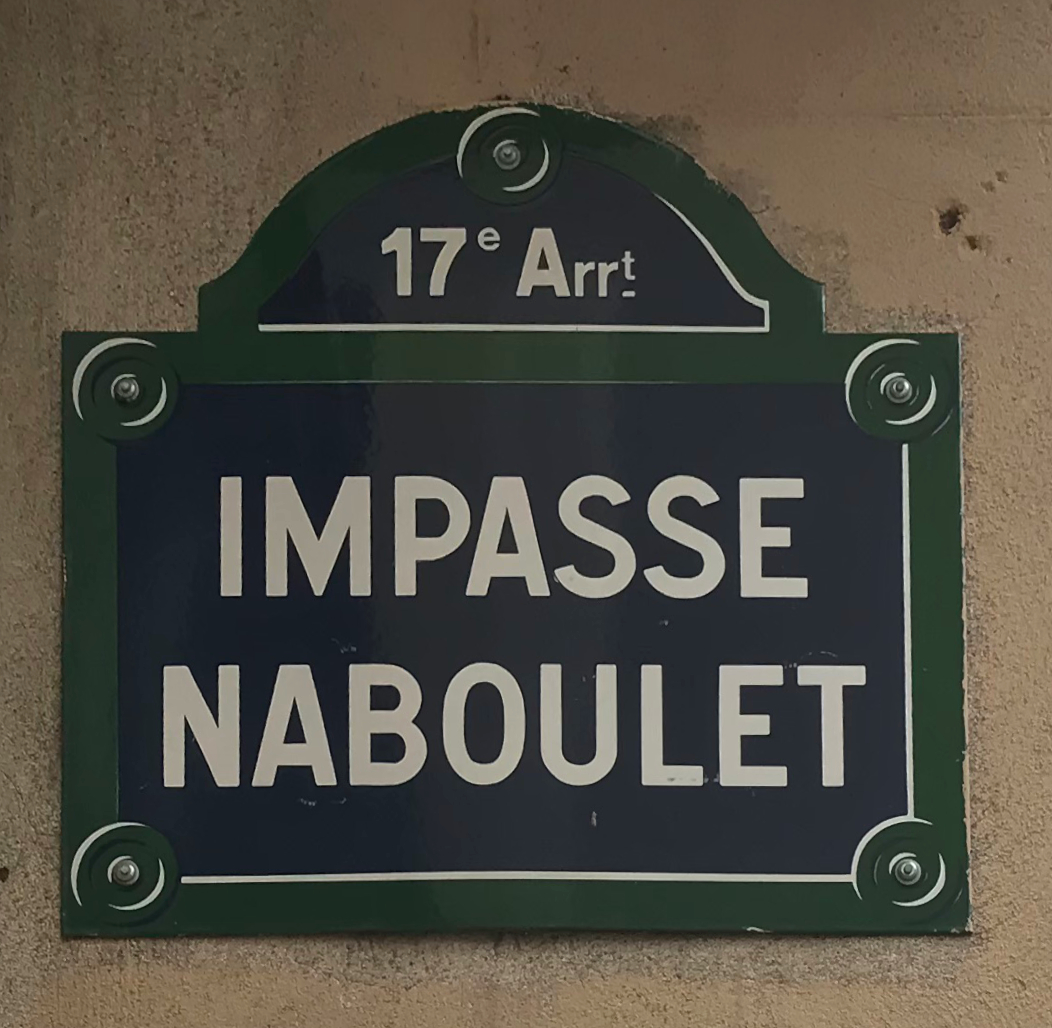 Image de Paris, septembre 2018.